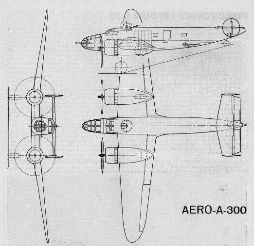 Aero A-300, skica (1938)